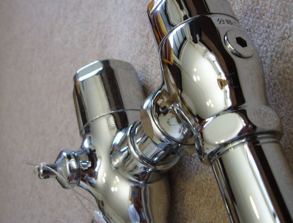 FV不凍結弁